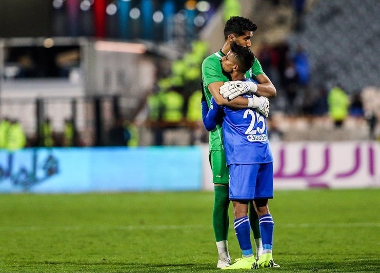 مهدی قایدی در آغوش حسین حسینی